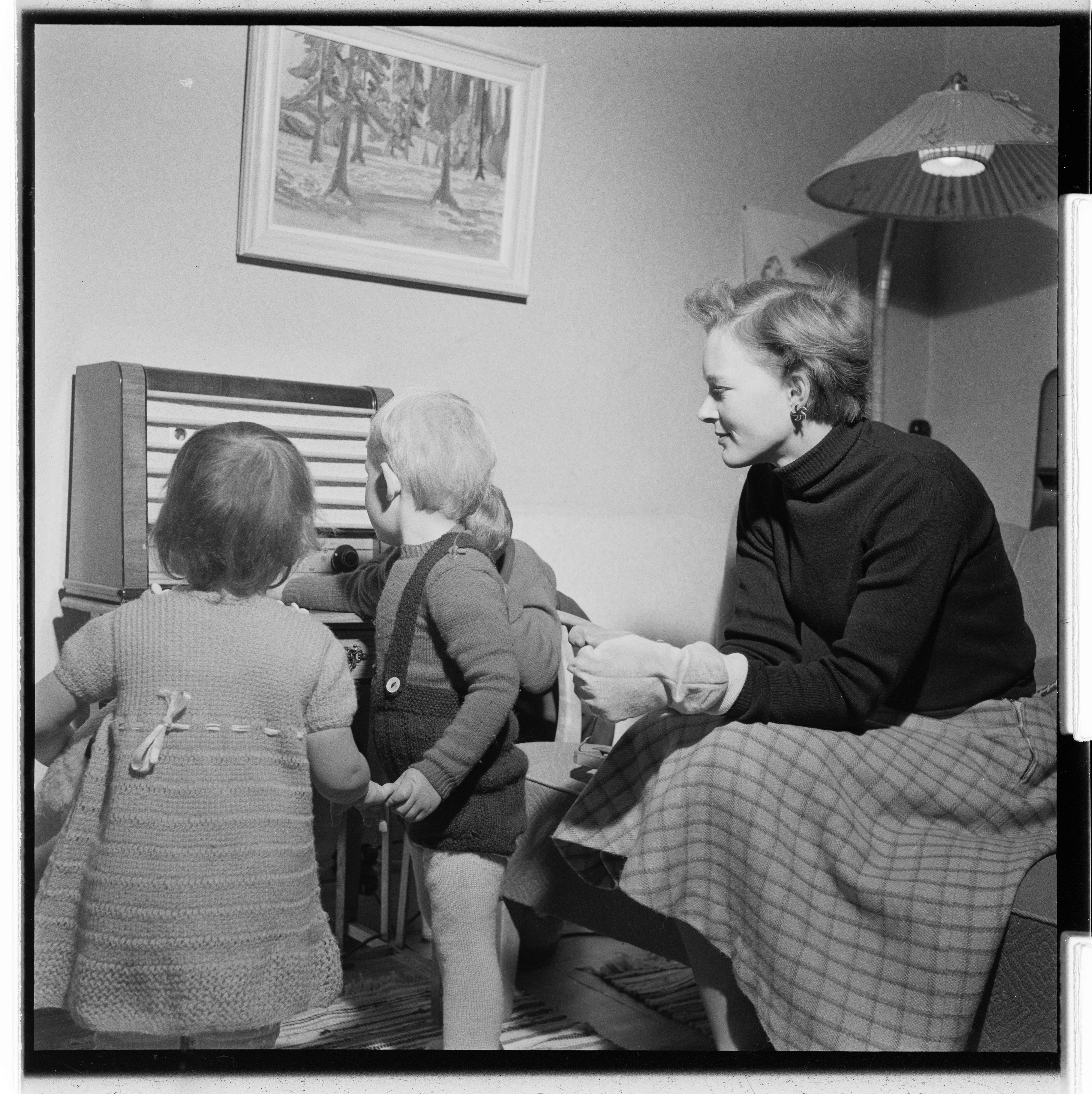 Bildet er hentet fra Arkivverket. Barnetimen for de minste, Norsk rikskringkasting. NÅ nr. 23 Arkivinstitusjon : Riksarkivet Arkivnavn : Billedbladet NÅ Sted : Norge, Oslo, Oslo, Emneord: Barnetimen for de minste, Kvinne, Gutter, Pike, Stue, Radio, Barn, NRK, Norsk Rikskringkasting, Jente Avbildet